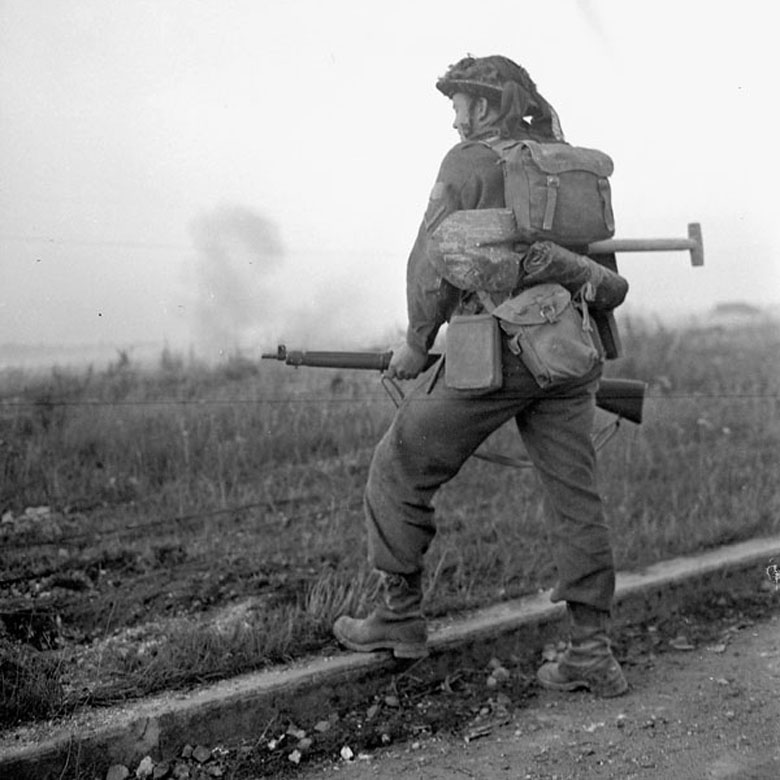 Opération Spring 25 juillet 1944